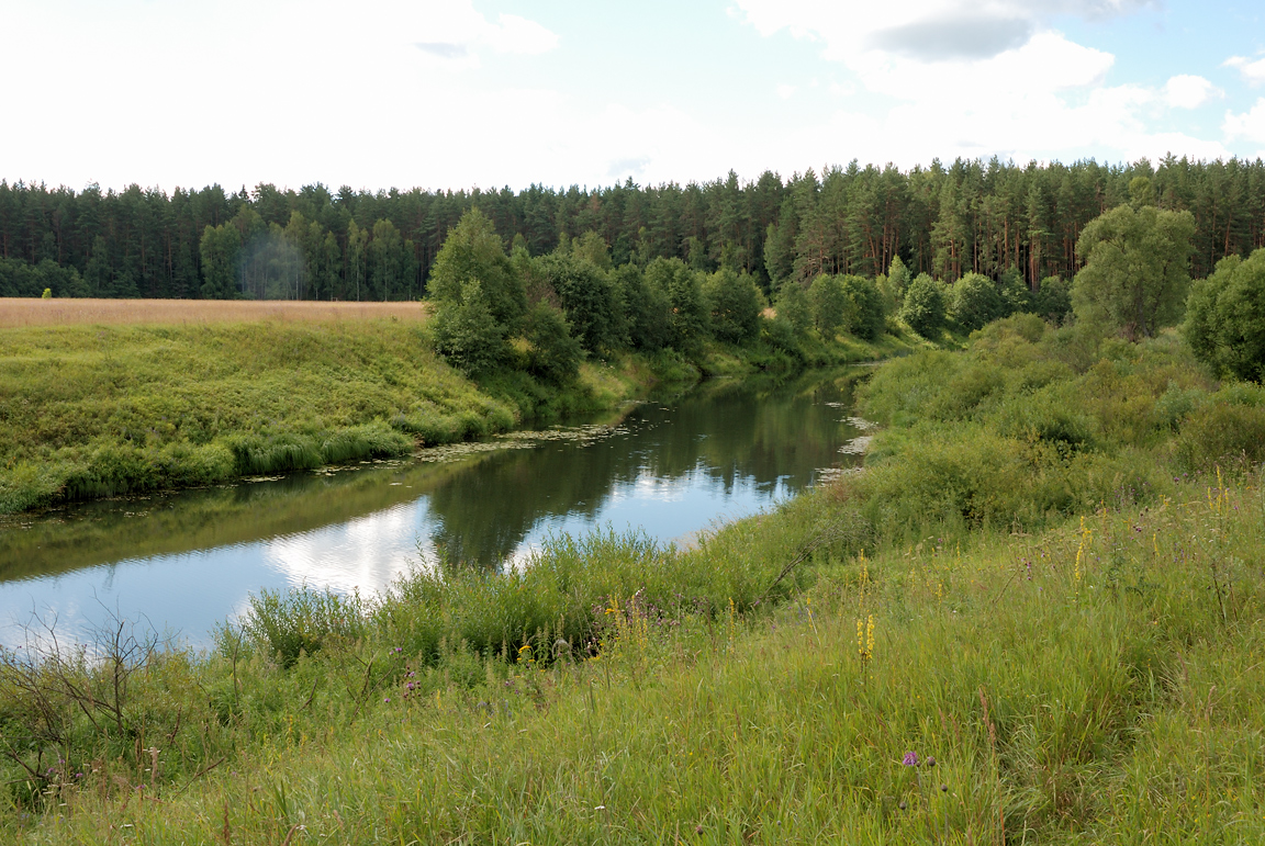 Река Шоша у села Микулино